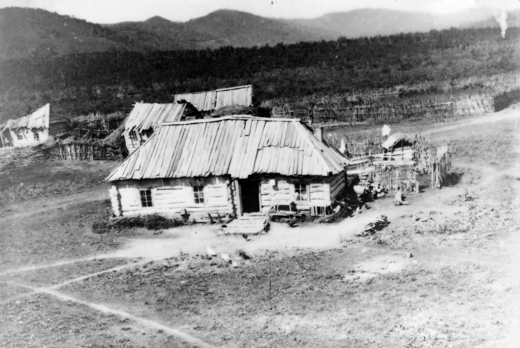 Деревня Владимировка, конец XIX века